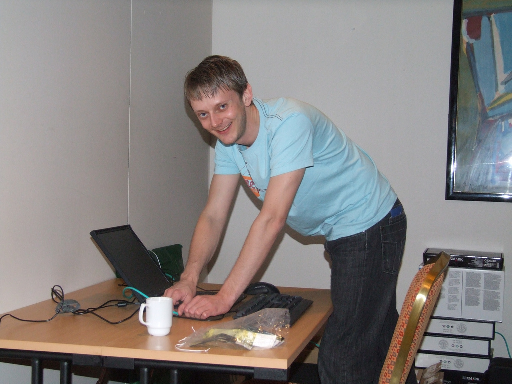 Erlend Fuglum ble plutselig (?) teknisk delegert. Og godt er det - b�de for oss andre og landsm�tet :-)